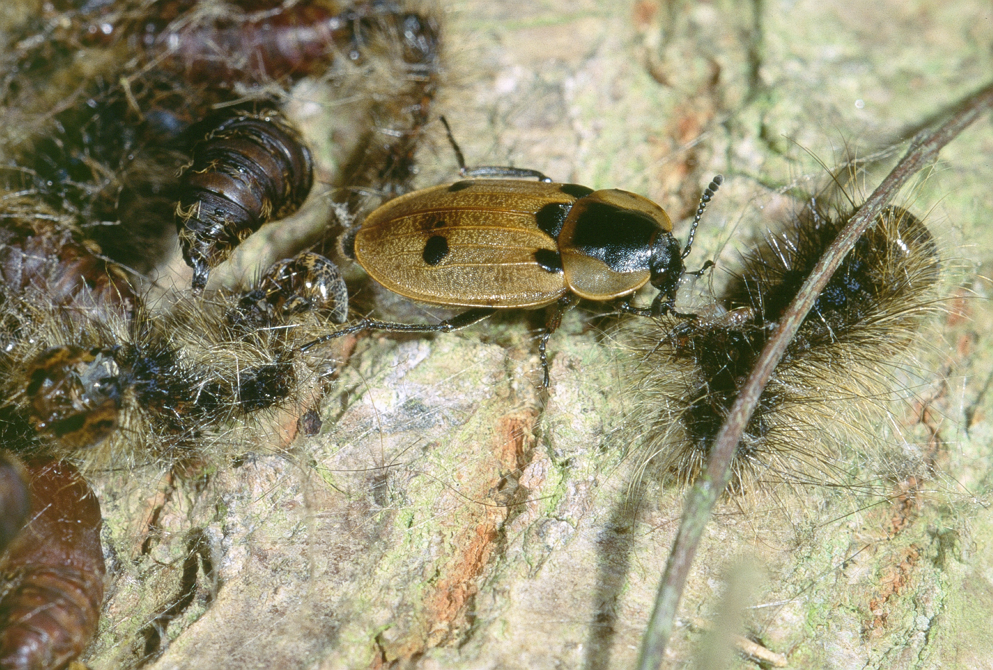 Dendroxena quadrimaculata se nourrissant de chenilles de Bombyx disparate (la Spongieuse) lors de l'infestation de la forêt de Grimbosq (14) par cette espèce, à l'été 1993.